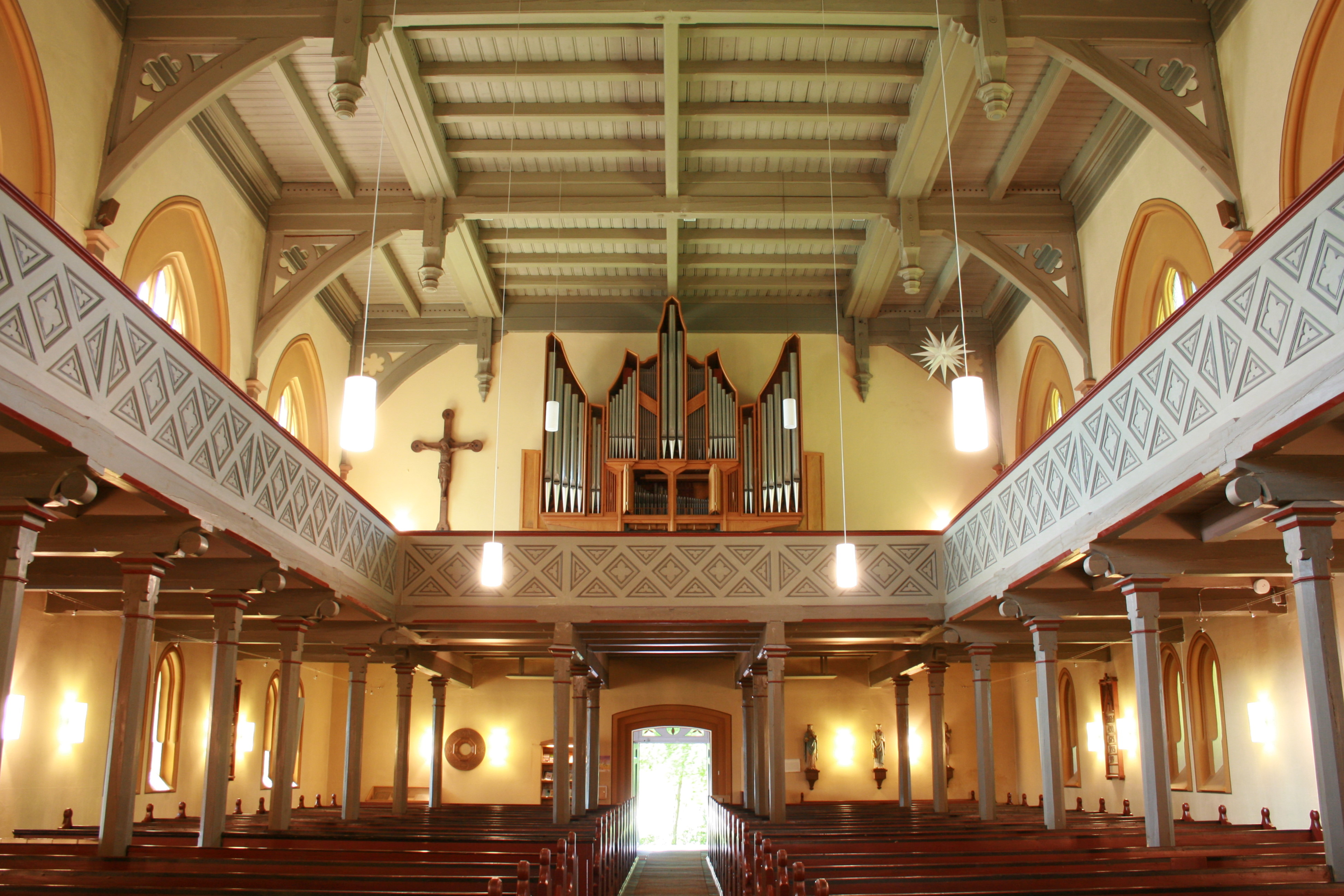 St. Bartholomäus, Hauptstraße in Neuenkirchen (Lüneburger Heide)